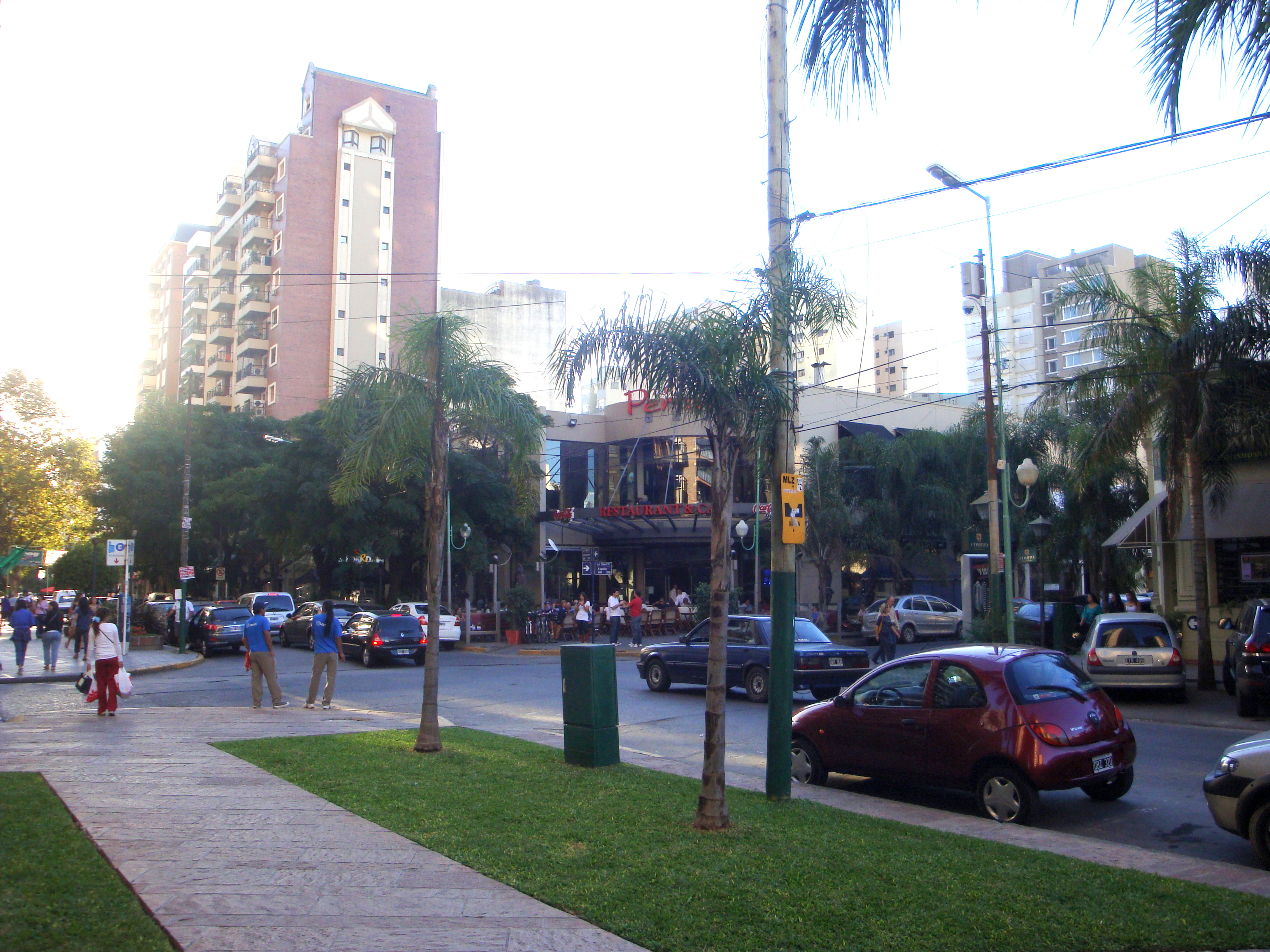 Barrio "Las Lomitas", Lomas de Zamora, Argentina